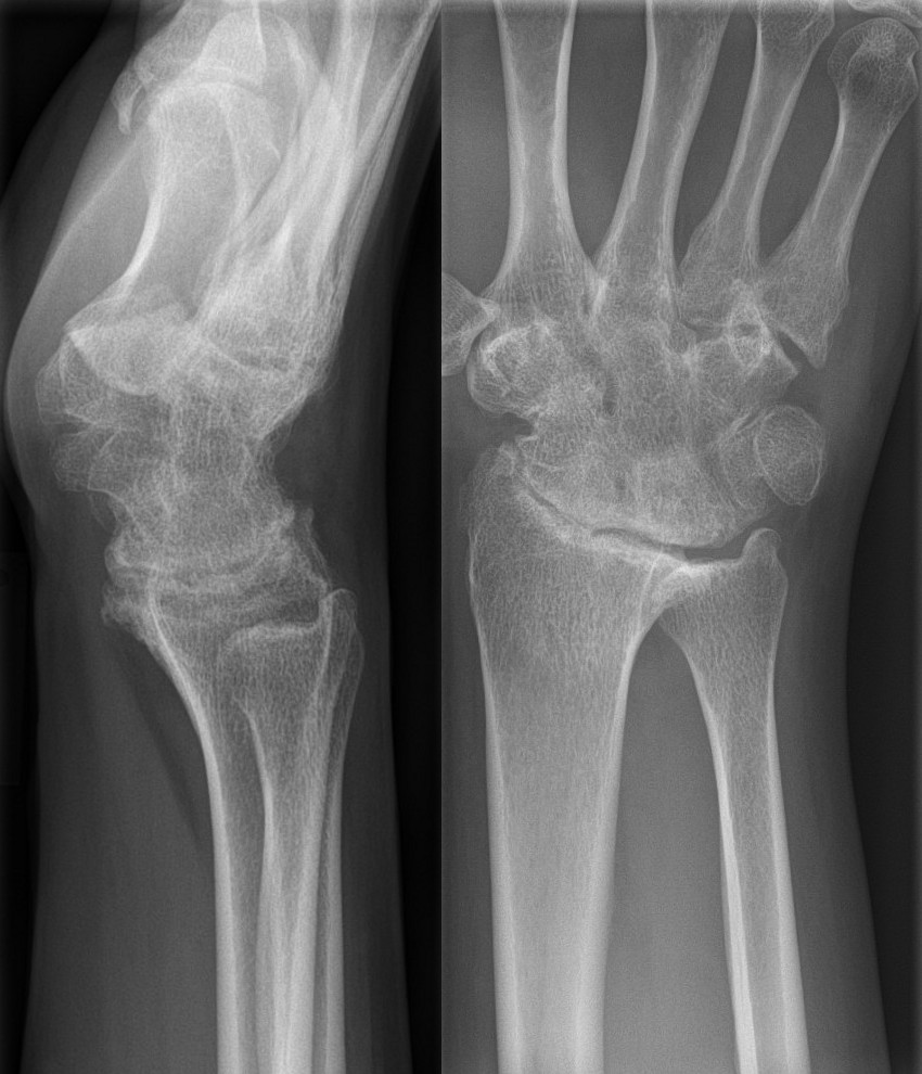 Ankylosen im Karpus bei einer ca. 40-jährigen Frau: Os carpale. Anamnestisch traten Beschwerden in der späten Jugend auf, so dass am ehesten von einer abgelaufenen juvenilen Arthritis auszugehen ist. Das Bild wäre auch passend. Aktuell keine Beschwerden, die auf eine aktive Arthritis hindeuten. Sekundäre arhtrotische Veränderungen der an die versteiften Gelenke angrenzenden Gelenke.